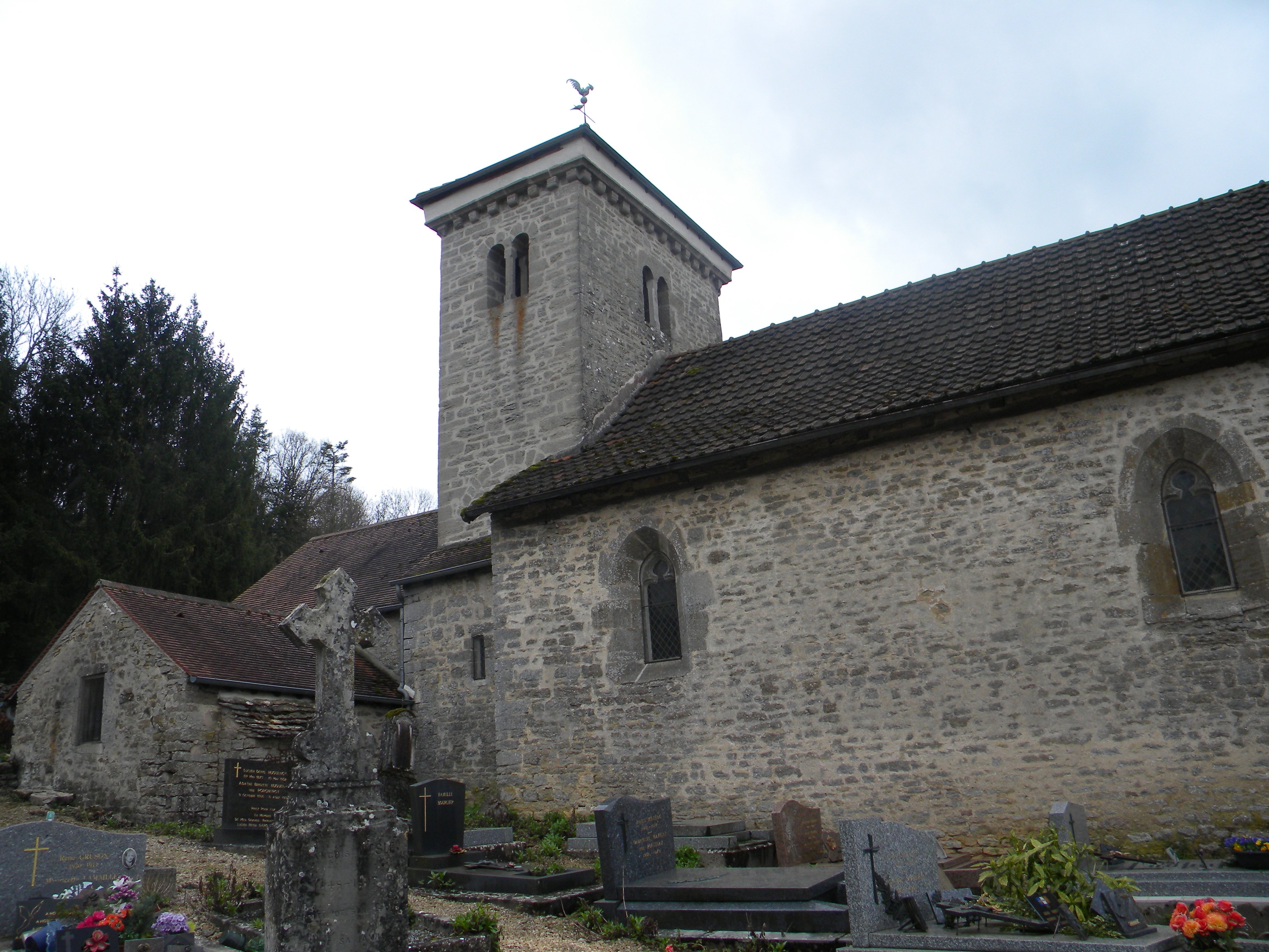 Preĝejo en Civry-en-Montagne